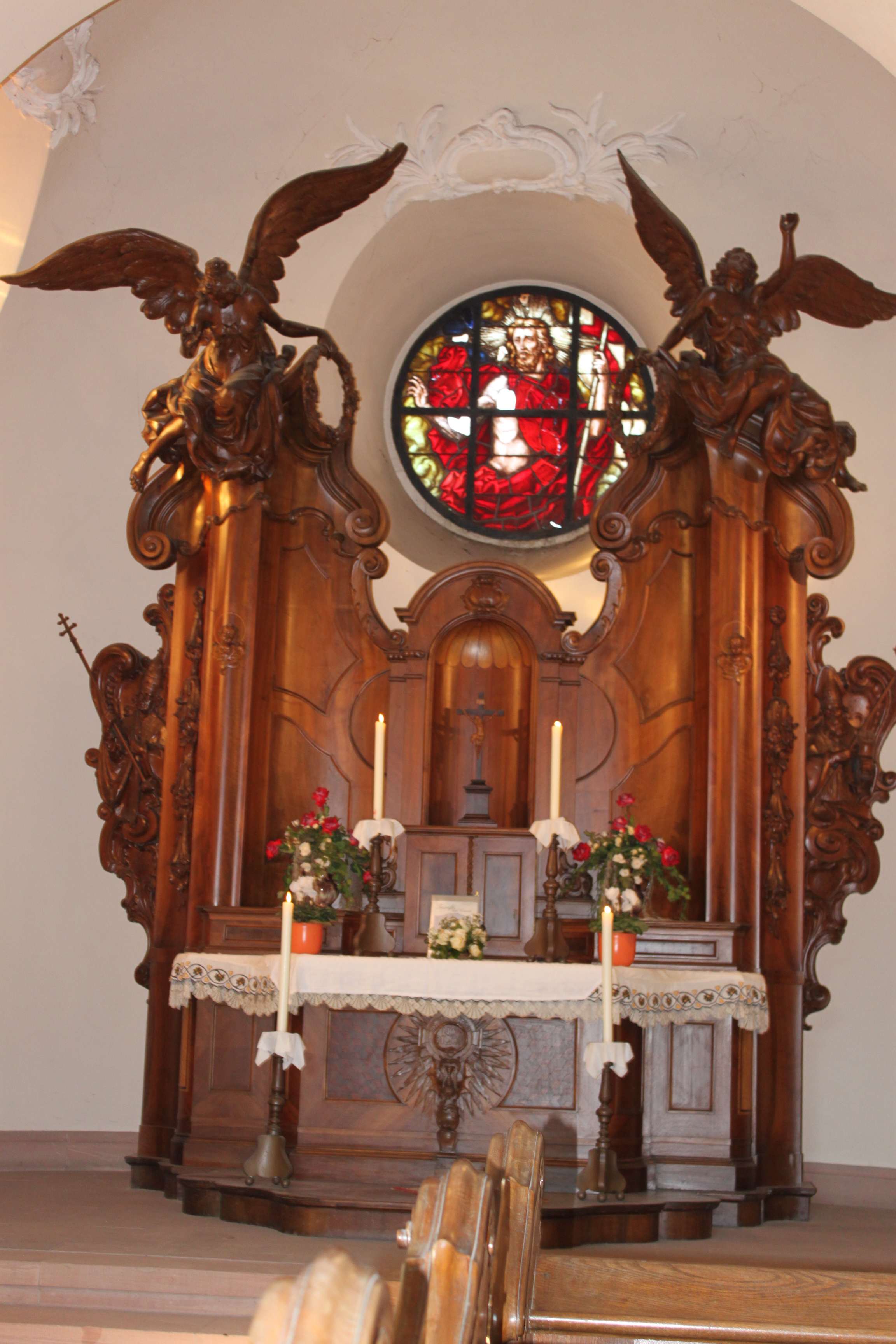 Hochalter in der Friedhofskapelle in Riegel am Kasierstuhl. Die Kapelle ist nur an Allerheiligen geöffnet